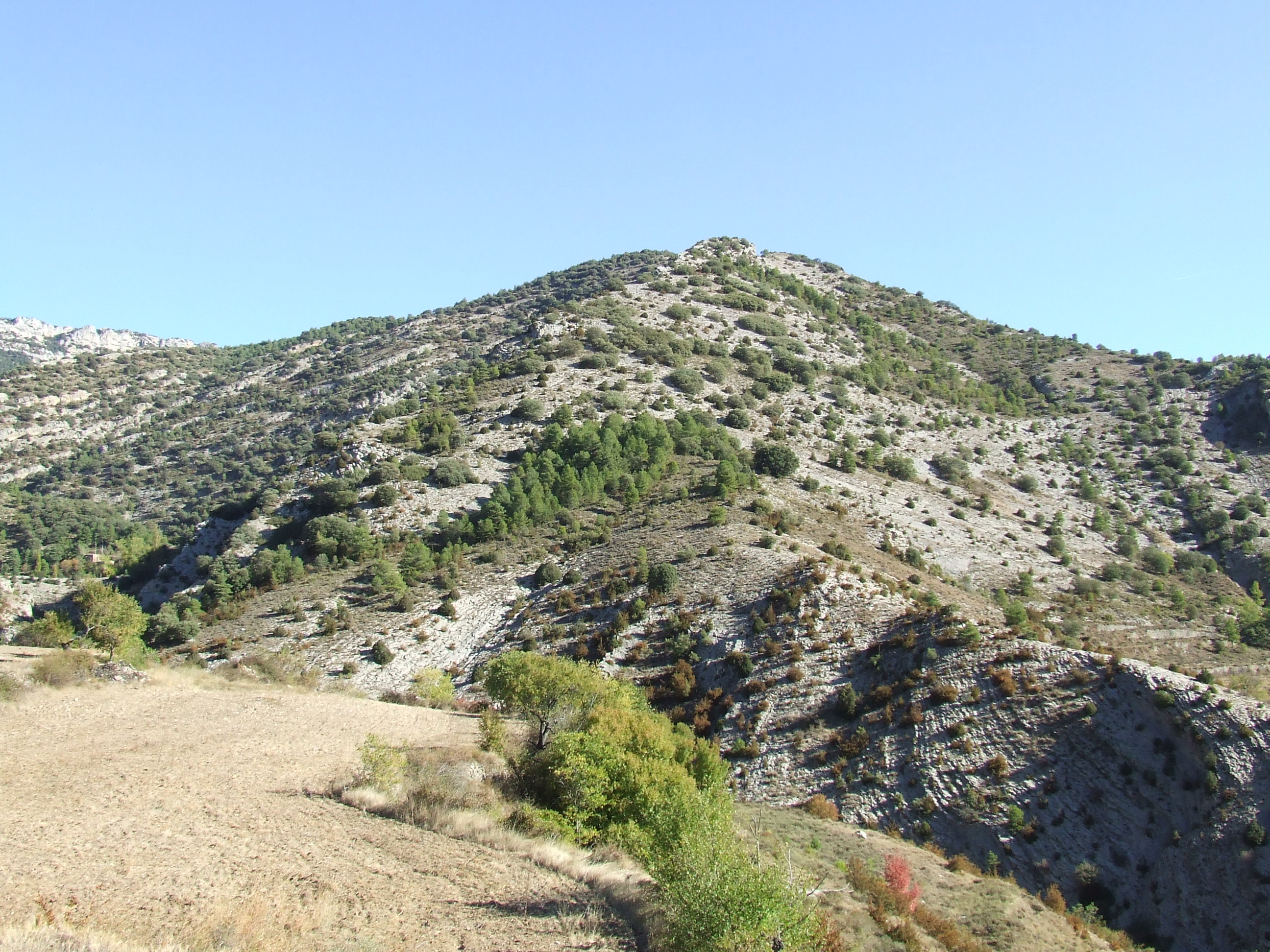 Les Llenes i Cap de les Llenes (Abella de la Conca, Pallars Jussà)